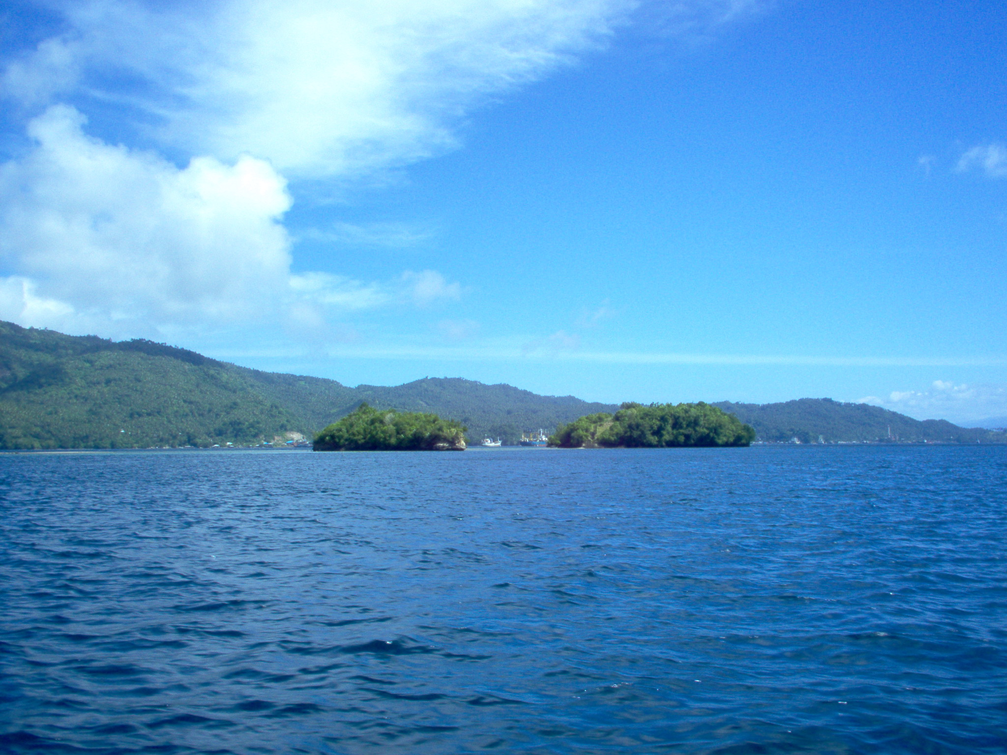 Selat lembeh